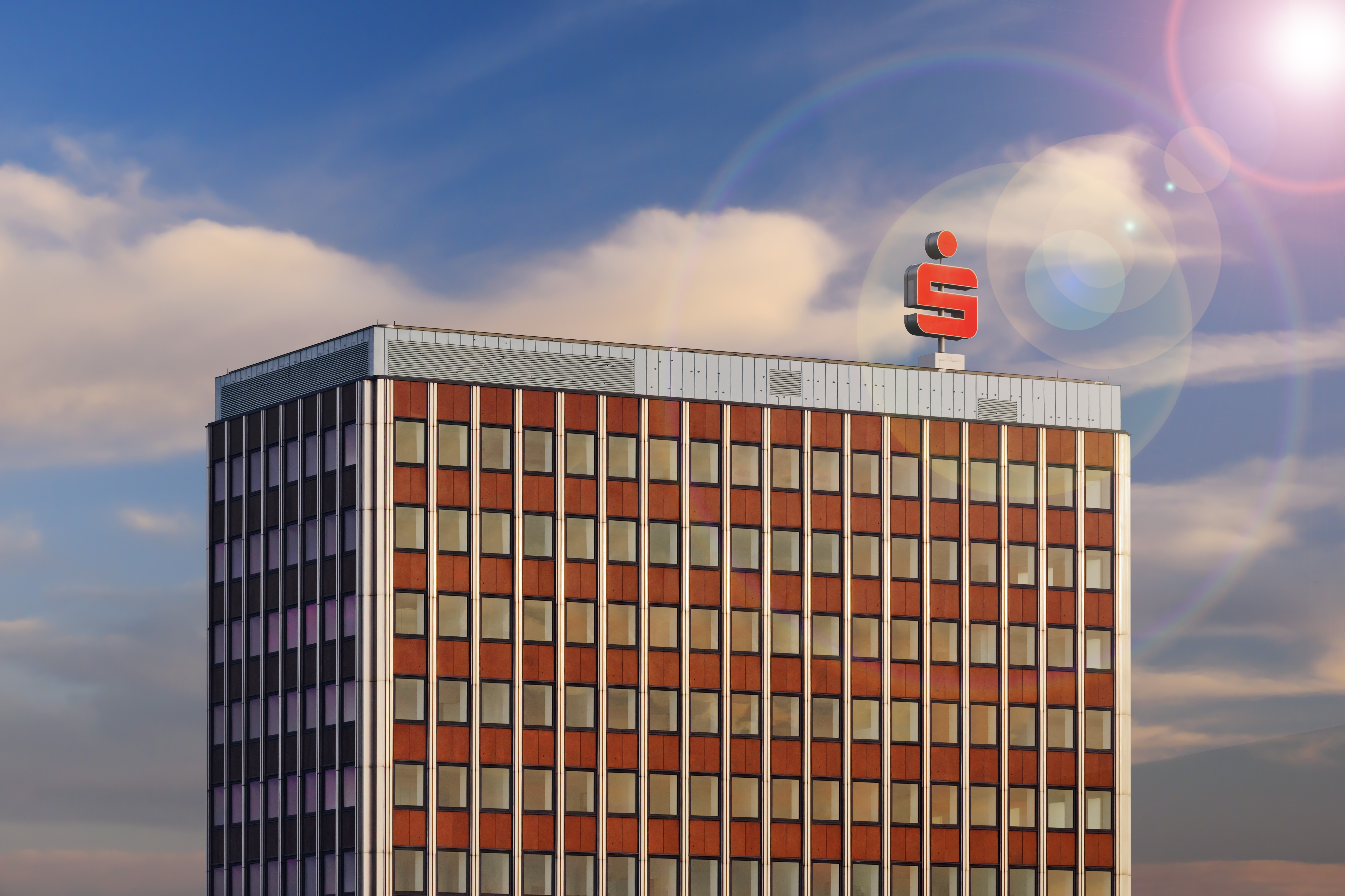 Hauptstelle der Sparkasse Dortmund